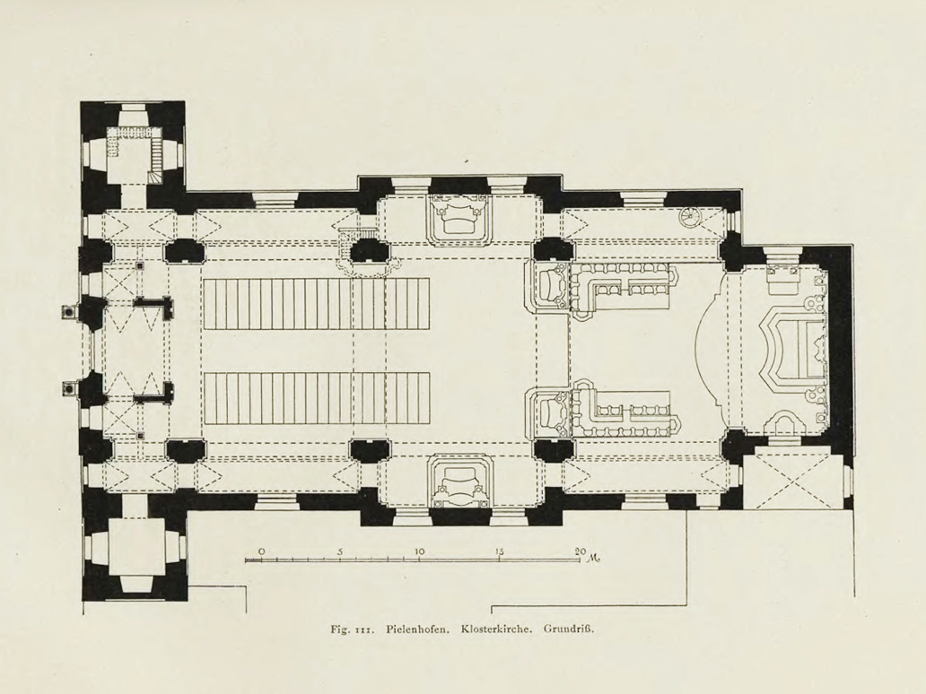 Der Grundriss der Klosterkirche Mariä Himmelfahrt in Pielenhofen an der Naab